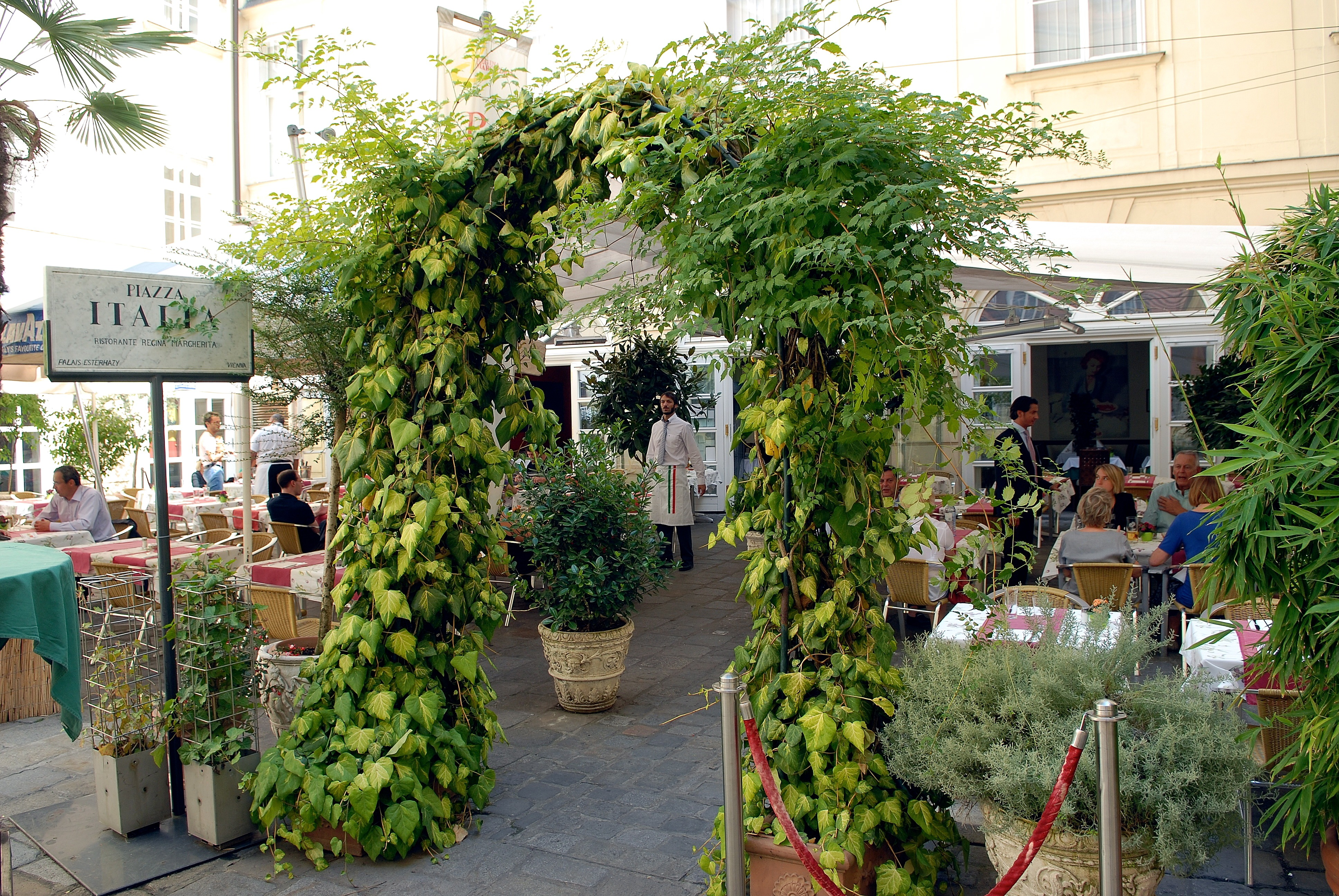 Ristorante Regina Margherita, 1010 Wien, Wallnerstraße 4, 2012